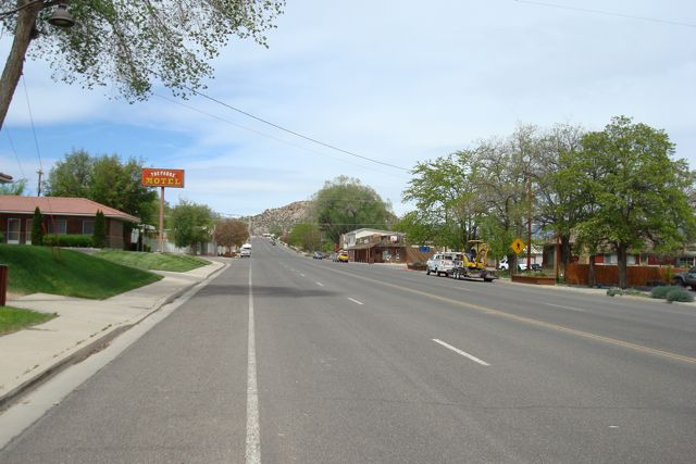 Sate Route 12 in Downtown Escalante